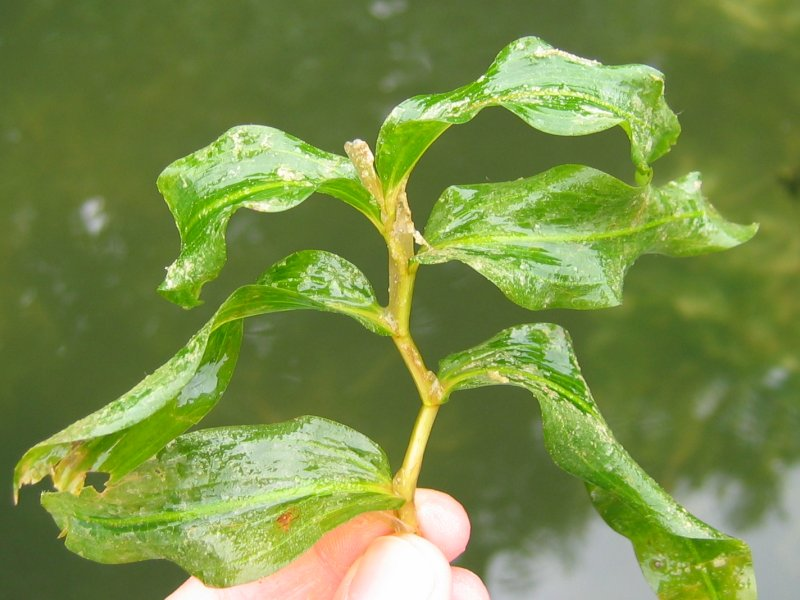 Langblättriges Laichkraut Potamogeton praelongus, Müritz-Gebiet